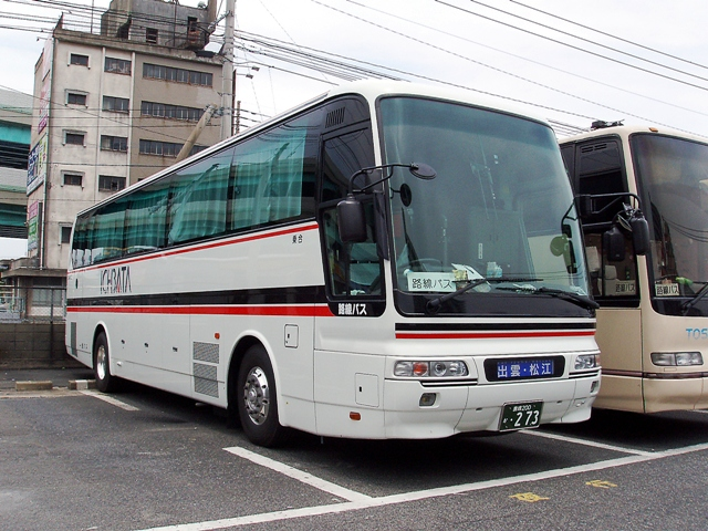 事業者: 一畑バス 陸運登録: 島根200か・273 シャーシ: 三菱ふそう KL-MS86MP 車体: MFBM 年式: 2005年 撮影場所: 千代営業所（許可済み）